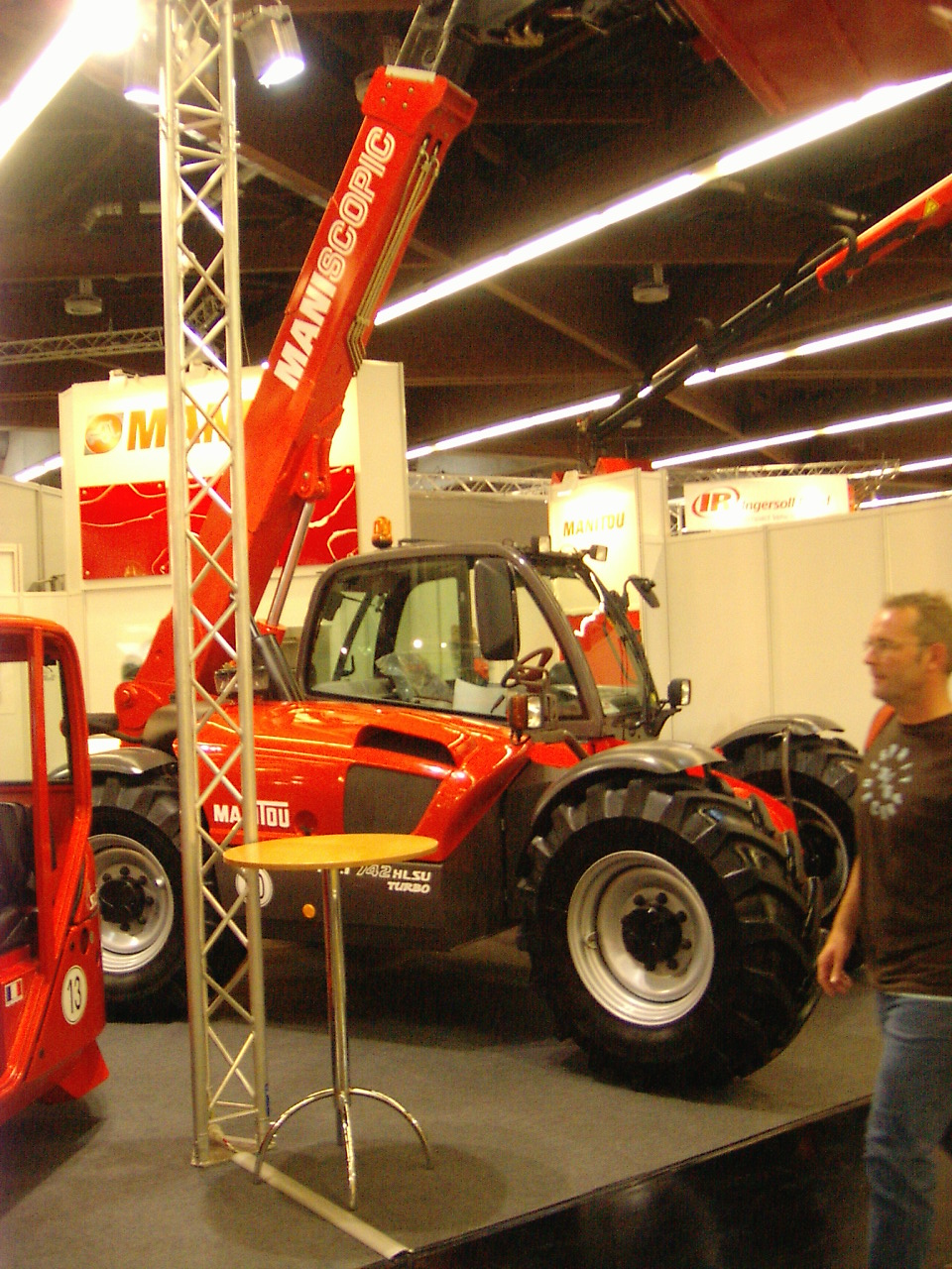 Manitou MLT 742 H LSU Turbo telescopische heflader/voorlader (verreiker) op GaLaBau 2006 in Nürnberg